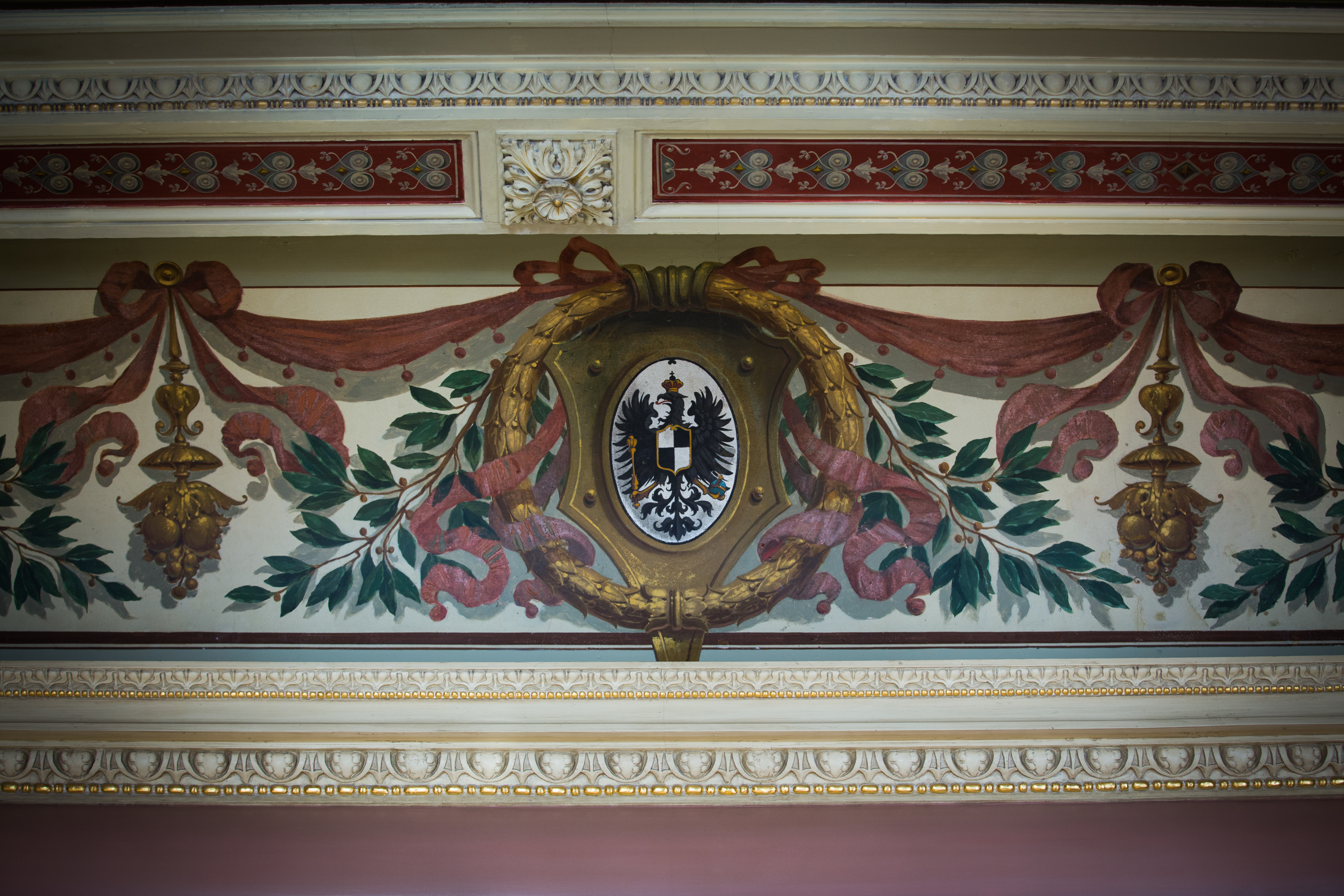 Strasbourg palais du Rhin fresque détail du plafond du salon de l’Empereur .